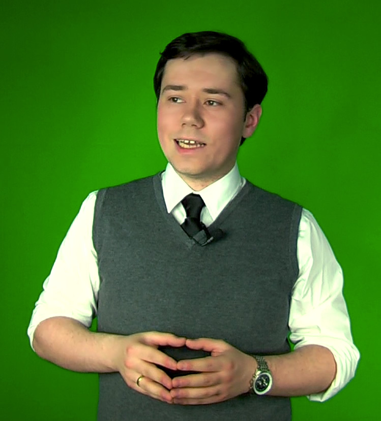 Rob Vegas vor einem Greenscreen